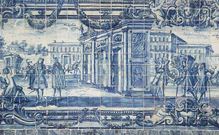 painel de azulejos portugueses na Igreja da Ordem Terceira Secular de São Francisco da Bahia, Salvador, Brasil